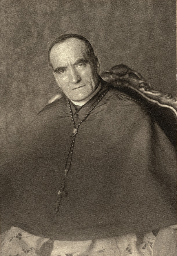 Arcivescovo Antonio Anastasio Rossi Udine, Civici musei, Fototeca